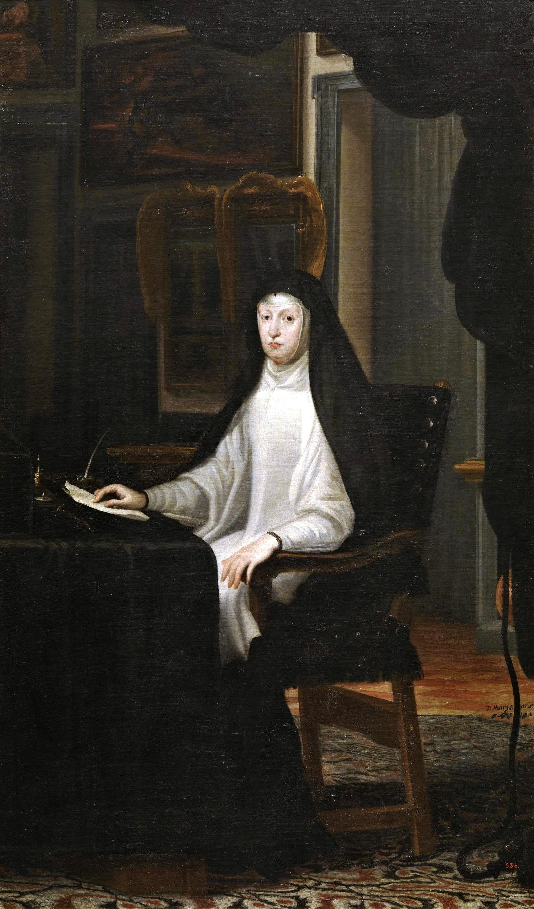 Retrato de la reina Mariana de Austria (1634-1696), que fue la segunda esposa del rey Felipe IV de España y la madre de Carlos II, durante cuya minoría de edad actuó como regente del reino.